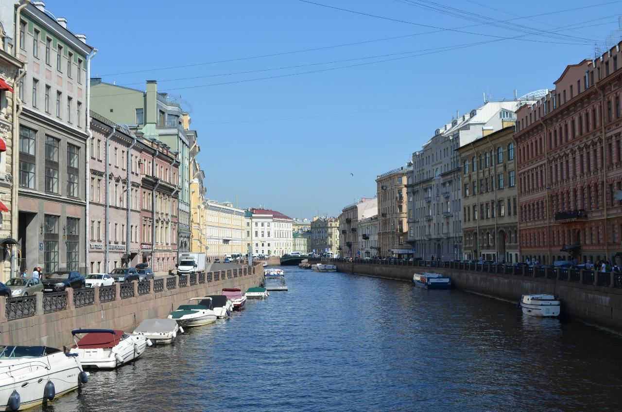 Санкт-Петербург. Мойка с Зелёного моста. Вид на север